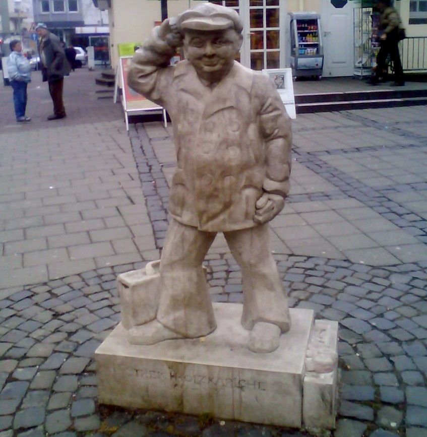 Skulptur von Karl Winterkorn, Offenbacher Unikum, bekannt als "Streichholzkarlchen" am Wilhelmsplatz in Offenbach am Main